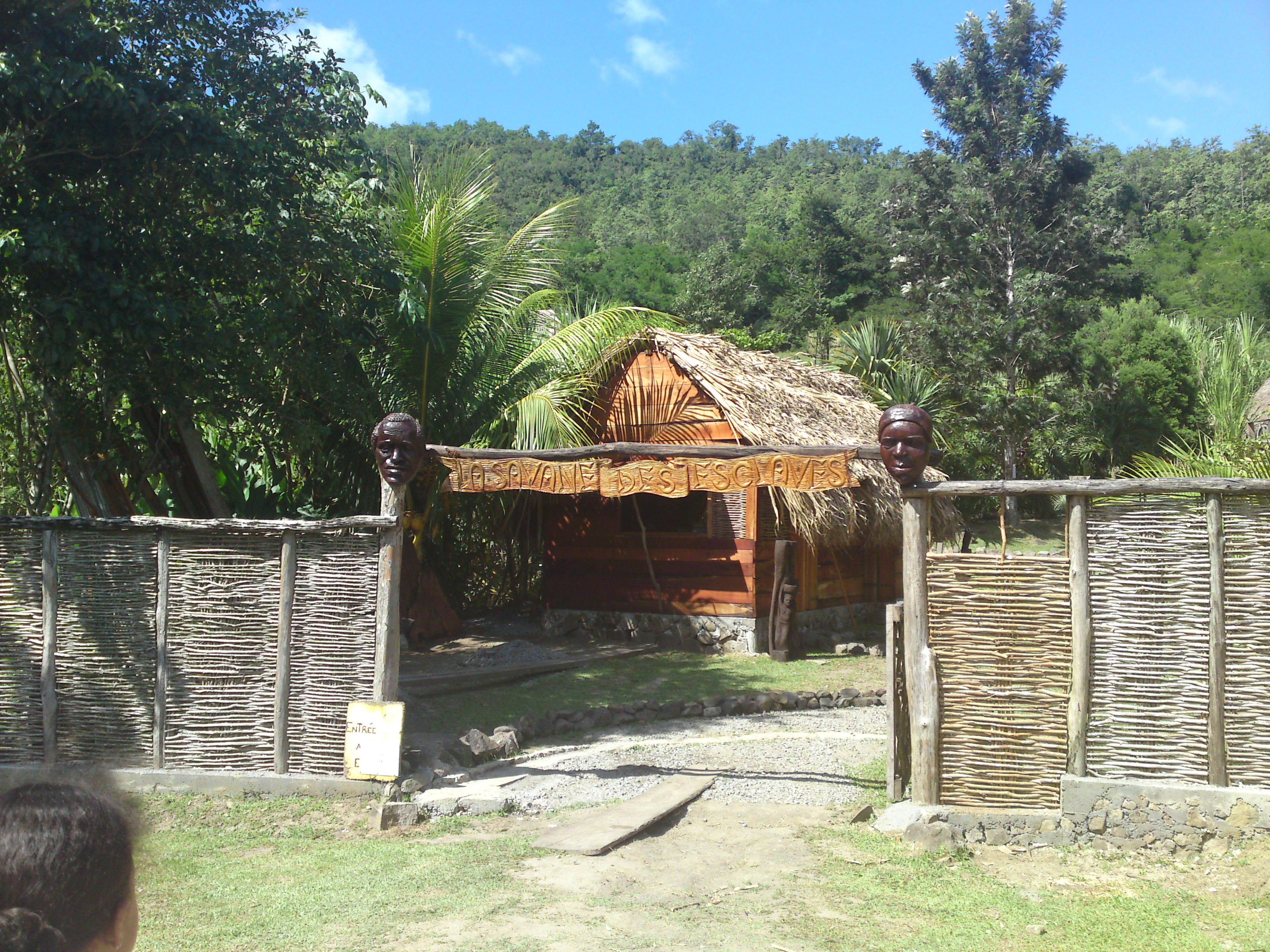 Entrée de la Savane des esclaves, Commune des trois-Ilets, en Martinique